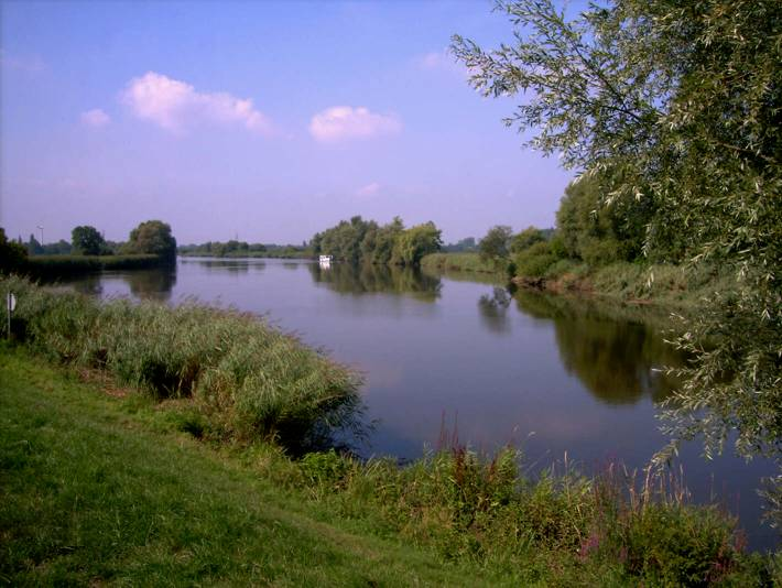 Mündung der Hamme (vorn) in die Lesum (hinten). Von links mündet die Wümme ebenfalls in die Lesum